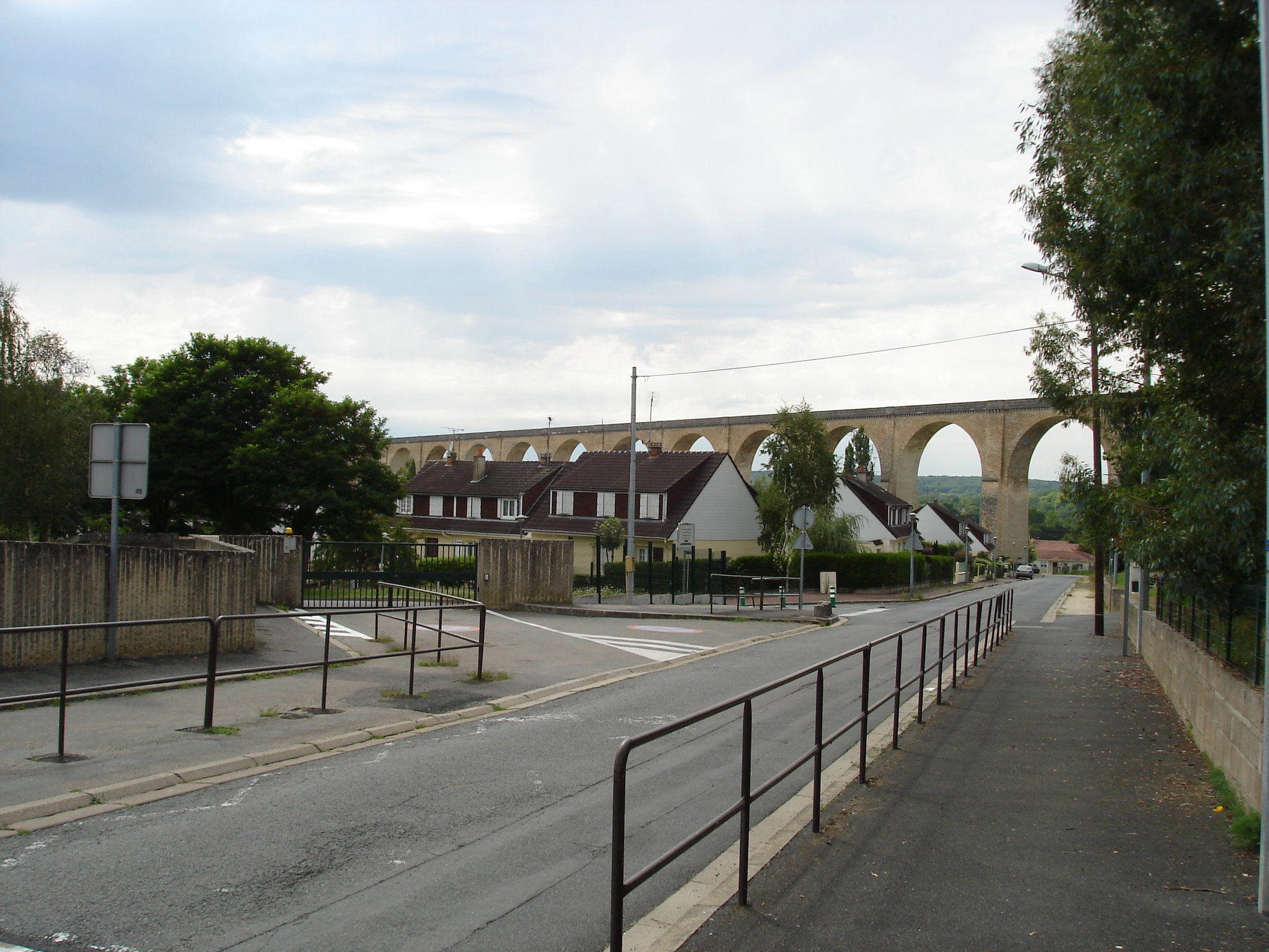 Le Blanc (36) : La rue des Ménigouttes.